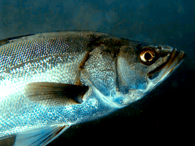 スズキ Lateolabrax japonicus